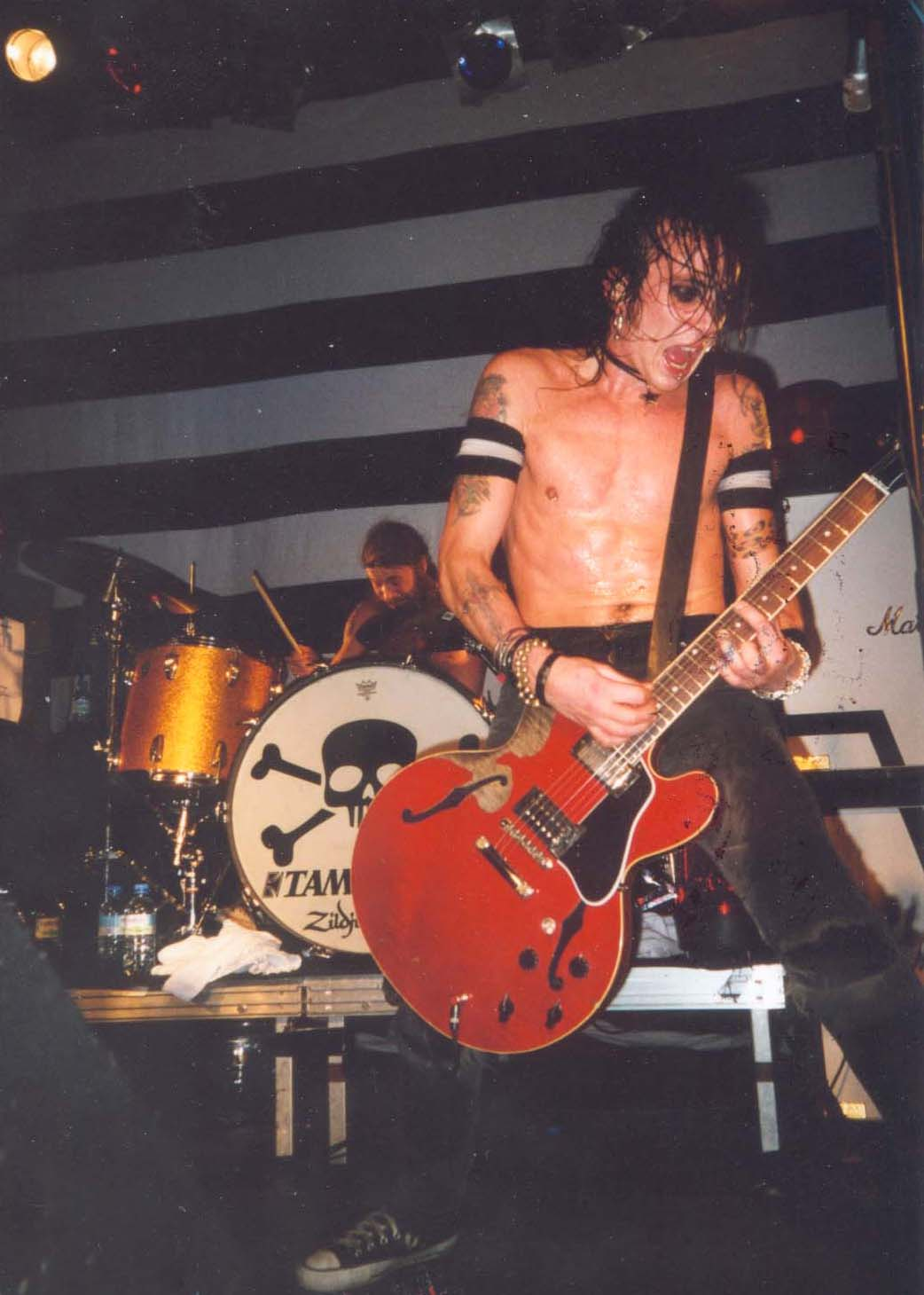 Andreas Tyrone Svensson "Dregen" mit den Backyard Babies im Schlachthof Hamburg